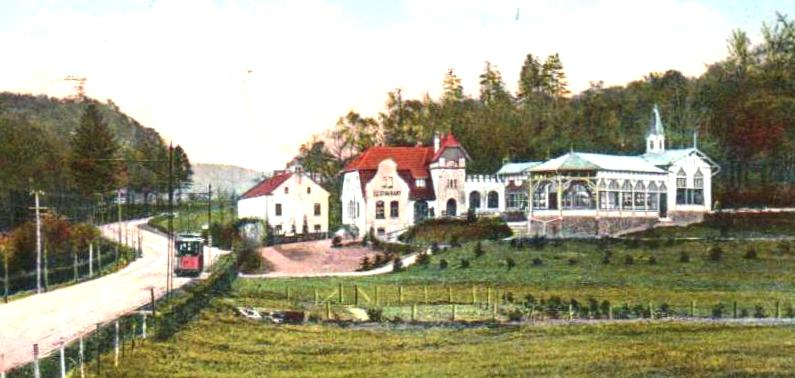 Ausflugslokal Neu-Linzenshäuschen